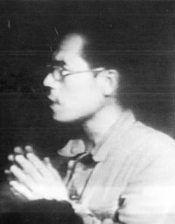 이현상, 1945년 11월 독립촉성중앙회에 참석